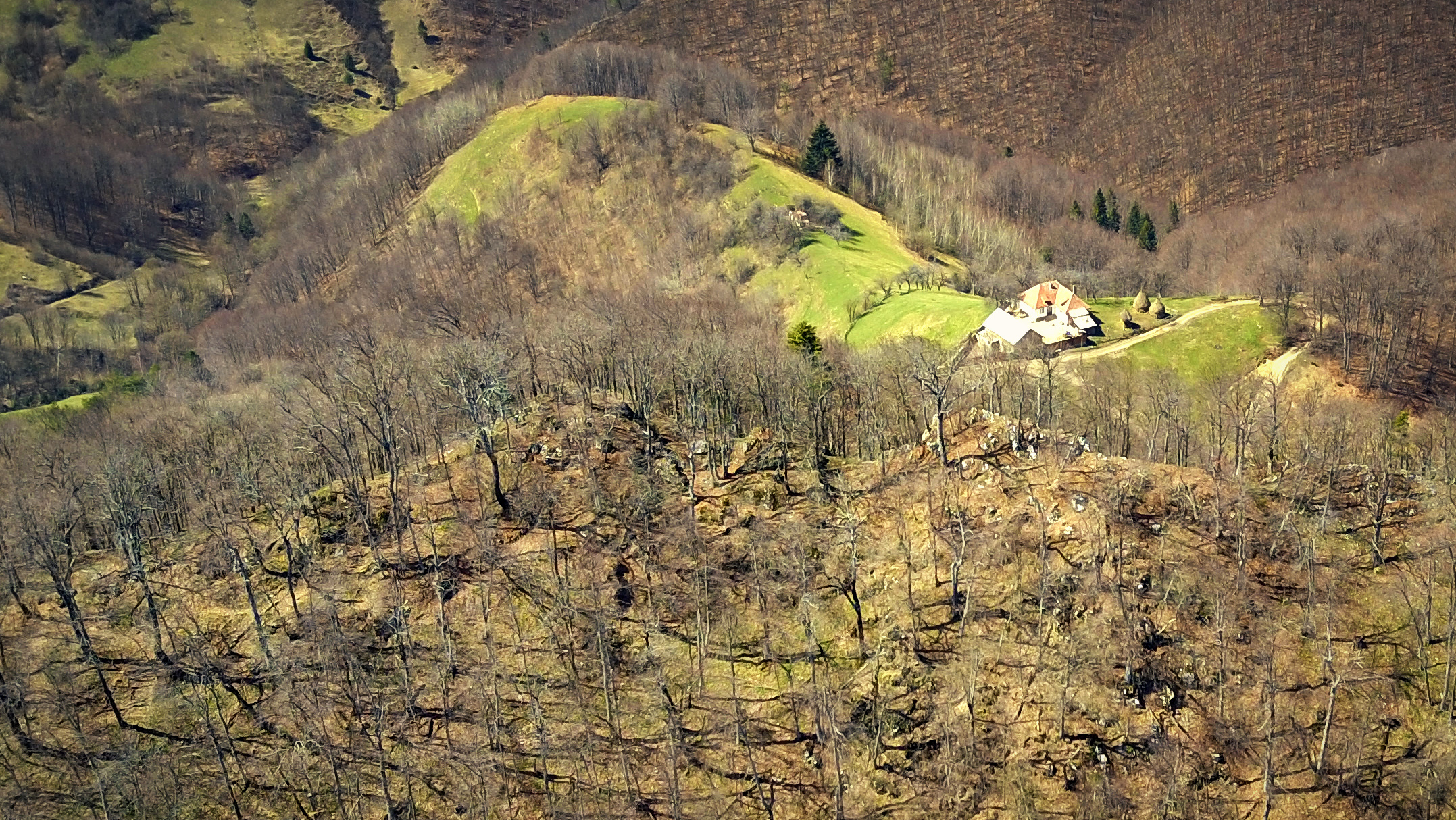 Fortificația medievală 01